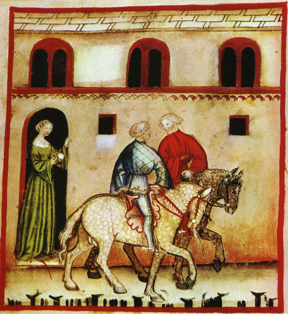 Tacuina sanitatis (XIV century) 9-svaghi, equitazione,Taccuino Sanitatis, Casanatense 4182.